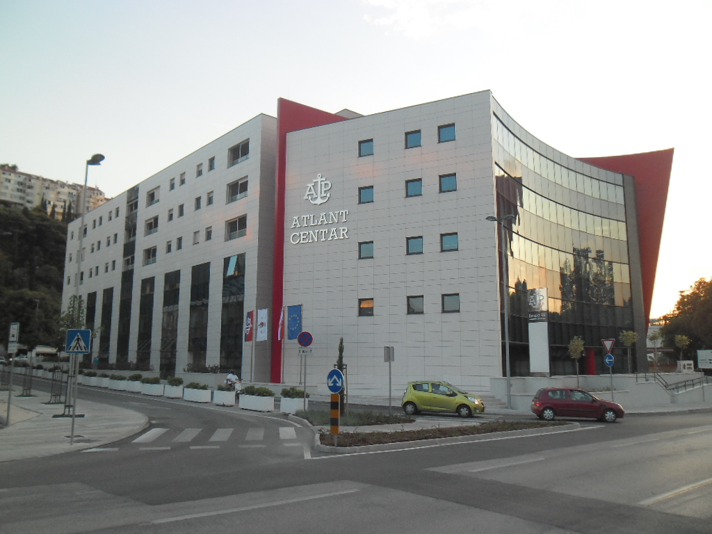 zgrada Atlantske plovidbe u Gružu, Dubrovnik